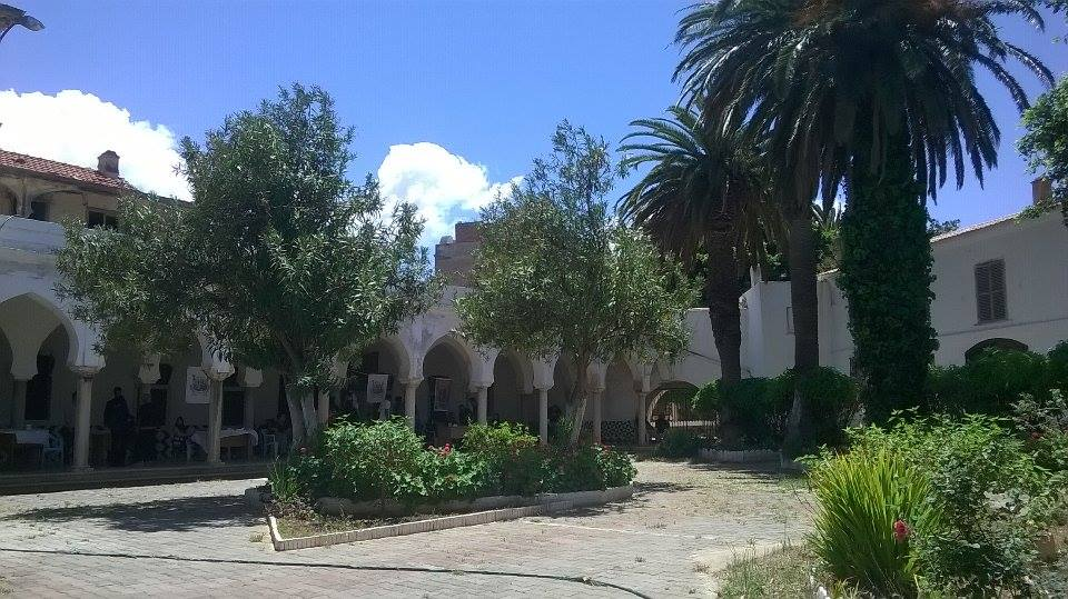 Palais du Bey d'Oran - jardin 2